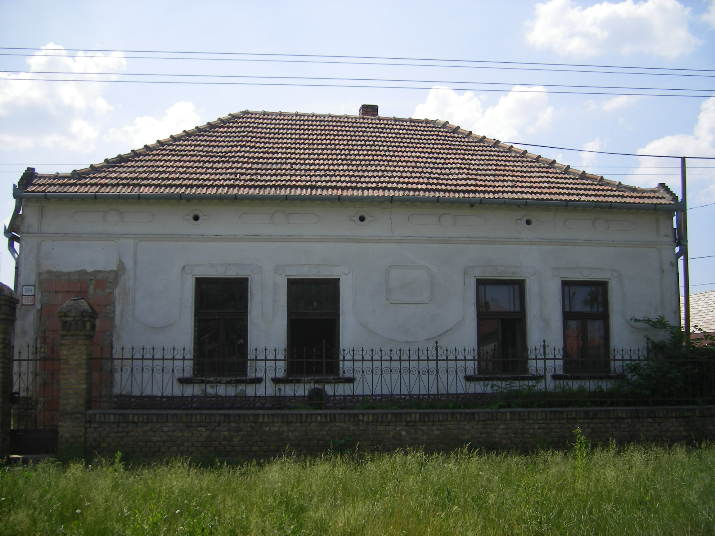 Perbete